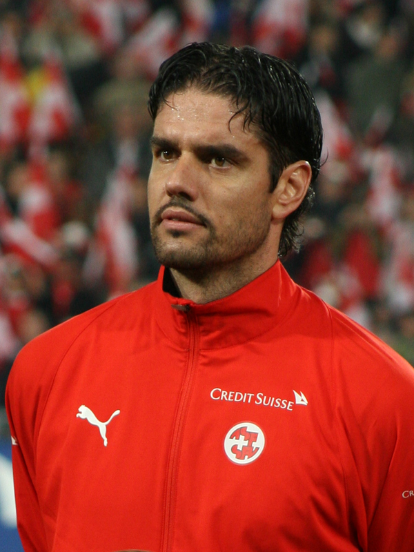 Pascal Zuberbühler, St. Jakob Stadion, Basel (Switzerland), Switzerland - Brasil 1:2